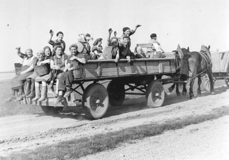 LPG Brehna, Rückkehr vom Feld Zentralbild Gerbeth 4.5.1953 Erster sozialistischer Brigaden-Wettbewerb in der Deutschen Demokratischen Republik bei der Produktionsgenossenschaft "Fortschritt" in Brehna (Kreis Bitterfeld) Durch die Einteilung aller Mitglieder der Produktionsgenossenschaft in Feldbau- und Viehzuchtbrigaden sowie durch die feste Zuteilung der Ackerflächen, Viehvestände, Zugkräfte, landwirtschaftlichen Maschinen und -Geräte war es möglich, dass die einzelnen Brigaden Verpflichtungen zur Steigerung der Arbeitsproduktivität und der Erträge eingehen konnten. Am 20.4.53 unterzeichneten die drei Feldbau- und die Viehzuchtbrigade ihre Verpflichtungen, die Erträge zu steigern und die Mitglieder fachlich weiter-zubilden. UBz: Auch während der Aussaat ist pünktlich um 16 00 Uhr Feierabend. Die weiblichen Mitglieder einer Feldbaubrigade auf der Heimfahrt nach getaner Arbeit.